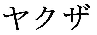 Yakuza written in katakana